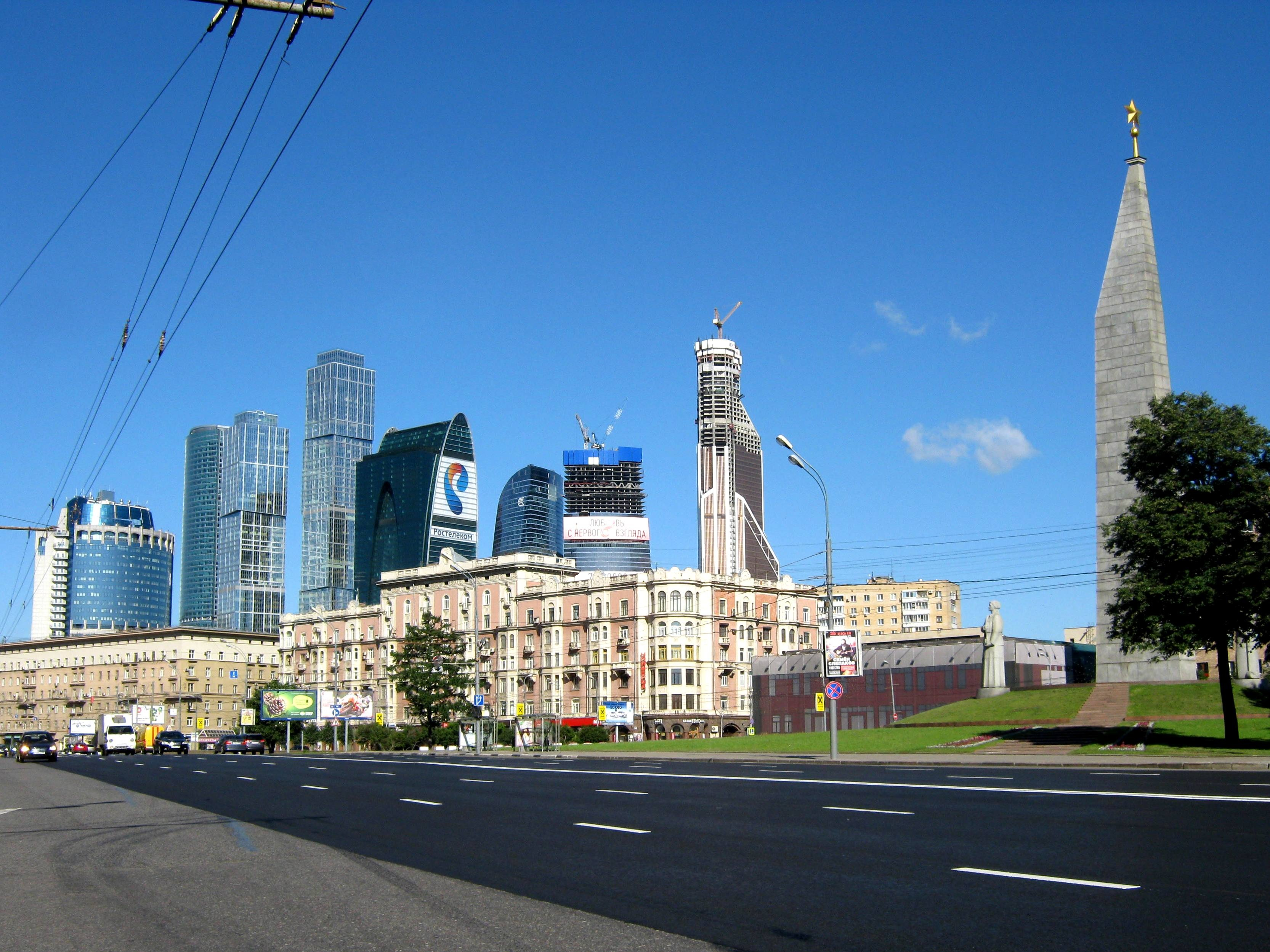 Площадь Дорогомиловская Застава